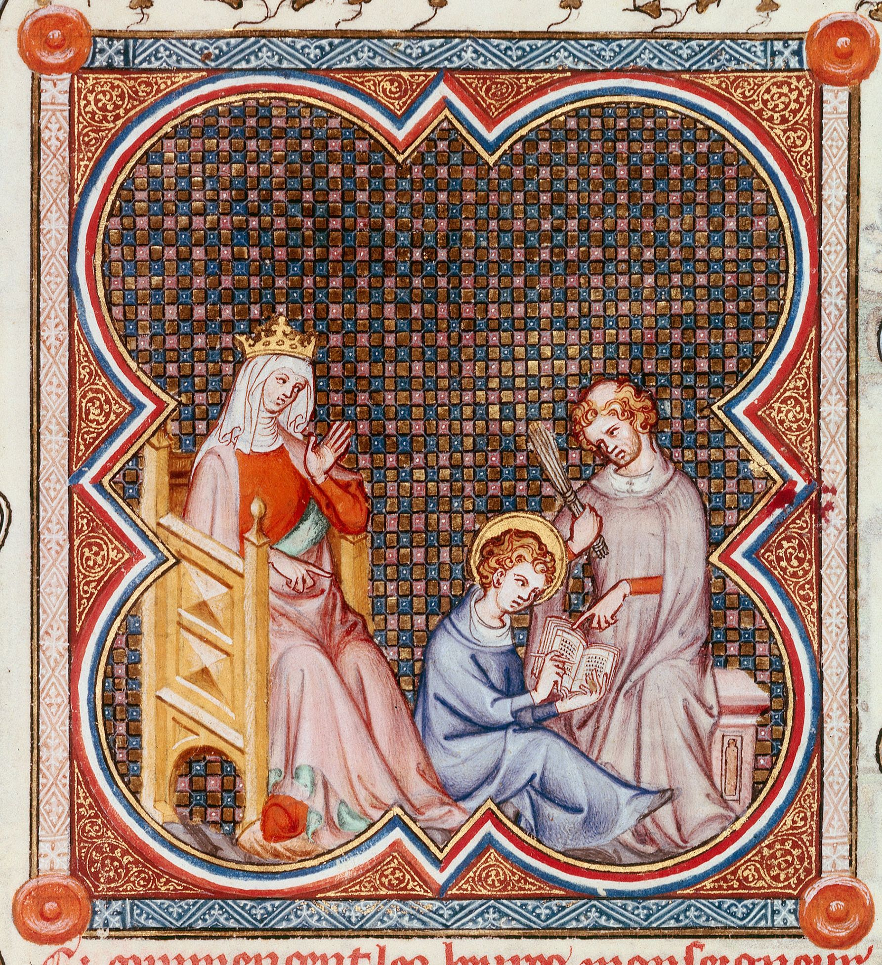 Blanka Kastilská se synem Ludvíkem a učitelem